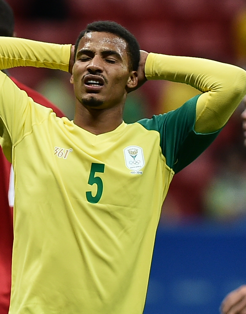 Estádio Nacional de Brasília Mané Garrincha, Brasília, DF, Brasil, 7/8/2016 Foto: Andre Borges/Agência Brasília. Dinamarca e África do Sul jogam neste domingo (7), no Estádio Mané Garrincha, pelo grupo A do futebol masculino nas Olimpíadas 2016. A Dinamarca venceu a África do Sul por 1x0, com gol de Robert Skov no segundo tempo.